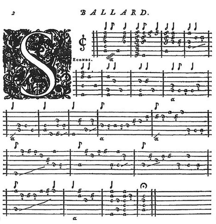 A music piece for lute by Robert II Ballard, 1612.